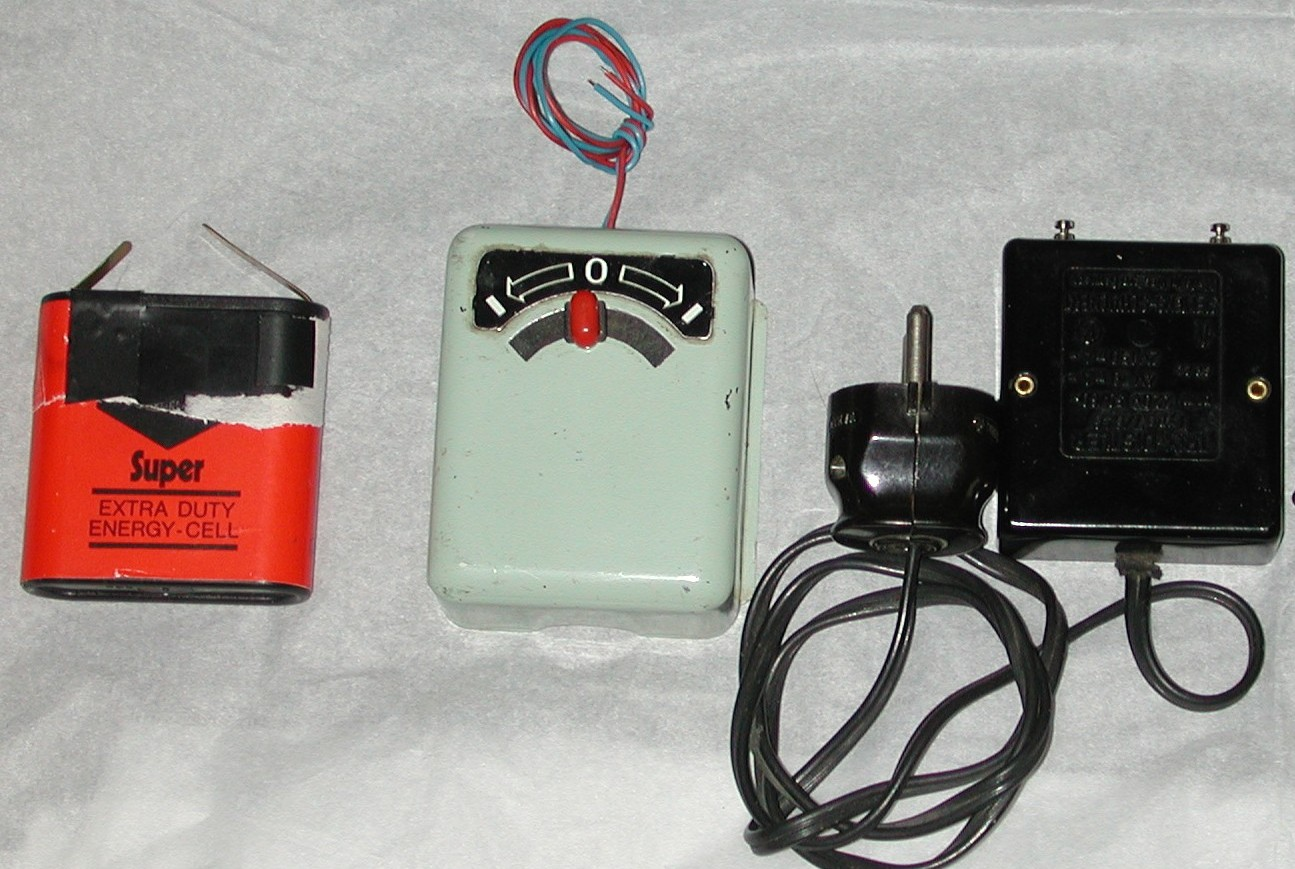 Trix Batteriebahn Technik - Fahrpult (Mitte) und die damals möglichen Energiequellen. Links die 4,5 V Blockbatterie, rechts das kompatible Netzanschlußgerät 7/946 von DISTLER. Foto: M. Linnenbach, GNU FDL